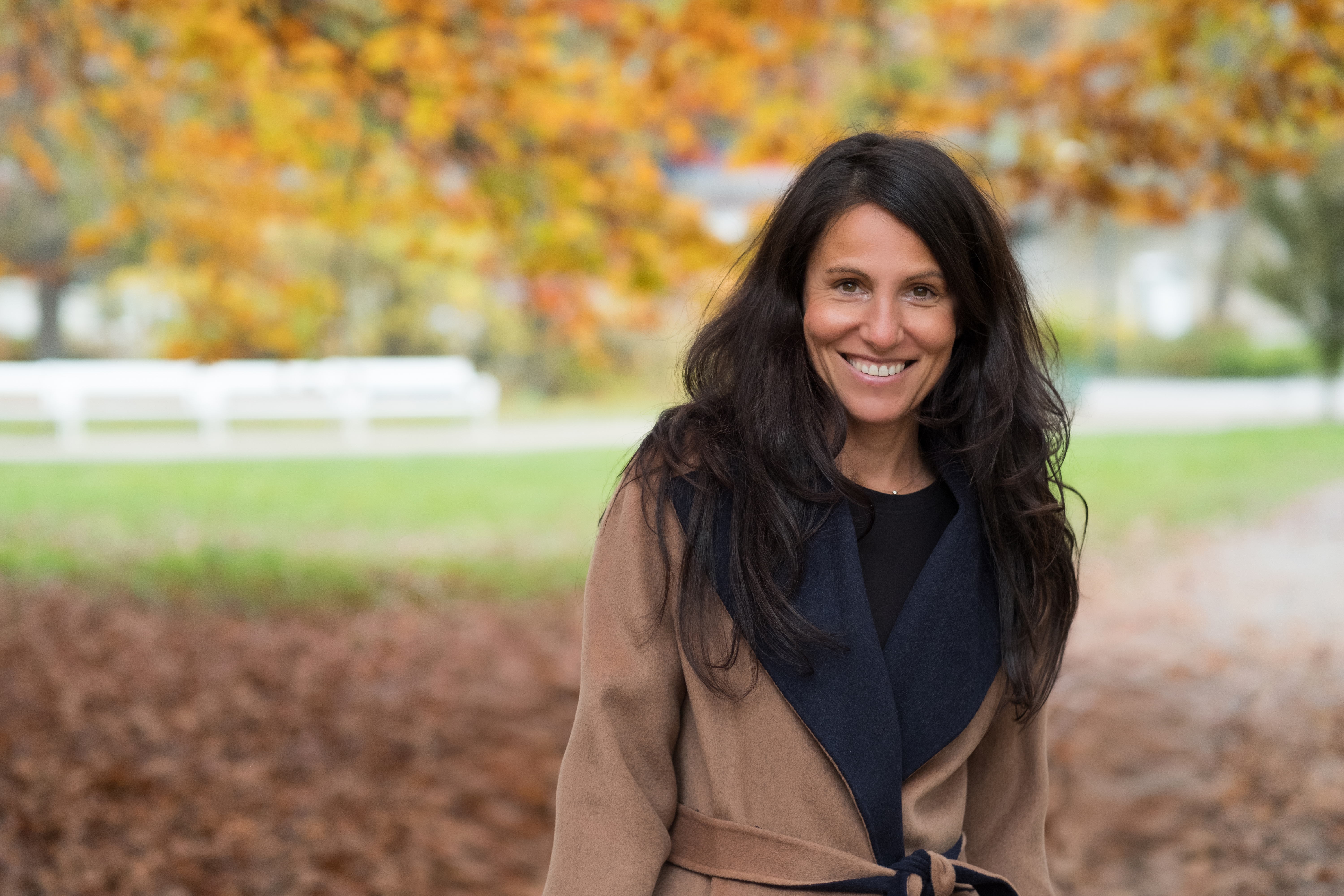 Primátorka Statutárního města Karlovy Vary